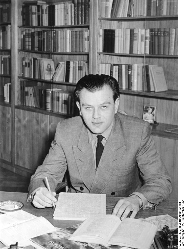 Zentralbild/Bez.Red.Leipzig (Kurbjuhn) 22.9.1955 Schriftsteller Erich Loest zu den Moskauer Verhandlungen Der Leipziger Schriftsteller Erich Loest, der durch seine Bücher "Die Westmark fällt weiter", "Das Jahr der Prüfungen", und "Jungen, die übrig blieben " bekannt wurde, erklärte zu den Verhandlungen, die zwischen der Regierungsdelegation der Deutschen Demokratischen Republik und der Regierungsvertretung der Sowjetunion in Moskau stattfanden. "Jetzt , nach den beglückenden Verhandlungen zwischen den Vertretern der Sowjetunion und der Deutschen Demokratischen Republik und der bevorstehenden Aufnahme der diplomatischen Beziehungen zwischen der UdSSR und der Deutschen Bundesrepublik ergibt sich die Hoffnung, dass Wirklichkeit wird, wonach sich jeder , dem die deutsche Kultur am Herzen liegt, seit Jahren sehnt: Der ungehinderte Austausch aller in Inhalt und Form dem Leben dienenden schriftstellerischen und publizistischen Werke in ganz Deutschland. Dass es nicht am Willen der Schriftsteller zur Einheit fehlt, haben diese tausendfach bewiesen; sie haben nach Möglichkeiten gesucht und diese gefunden, sie haben den persönlichen Kontakt in einer Zeit geknüpft, als der offizielle Kontakt fehlte. Jetzt ist es nötiger und möglicher denn je, auch die offiziellen Verbindungen zwischen den Kulturministerien in Berlin und Bonn aufzunehmen. In Berlin hat es an einer Bereitschaft dazu nie gefehlt, und man wird auch in Bonn einsehen müssen, dass noch kein Staat der Welt dem Geist auf die Dauer mit einer Politik der Stärke begegnen konnte. Wer sich zum Sprecher der Einheit deutscher Kultur macht, kann gewiss sein, alle, die den verpflichtenden Namen eines deutschen Schriftstellers verdienen, auf seiner Seite zu haben."